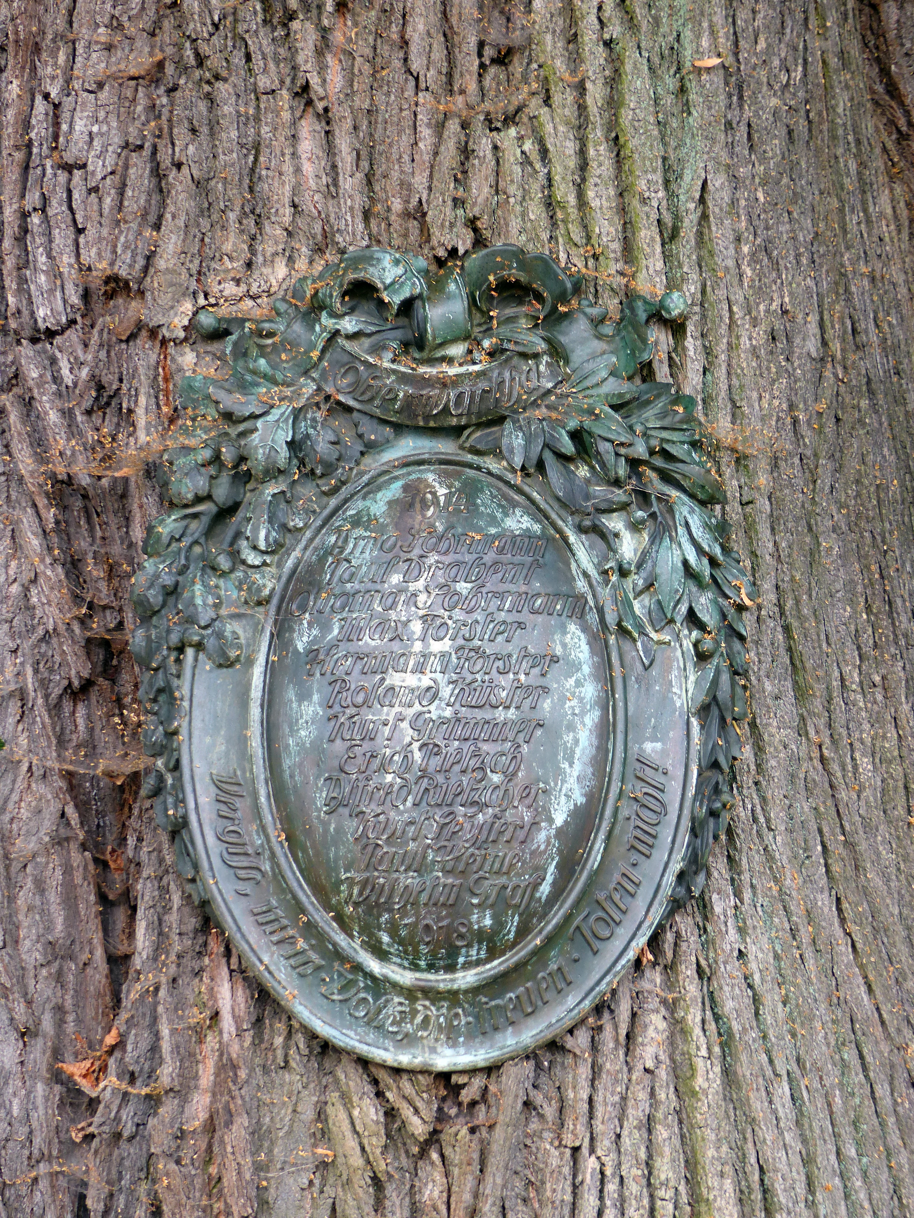 Naturdenkmal Dorflinde, Fritz-Arndt-Platz, Oberwartha, Dresden